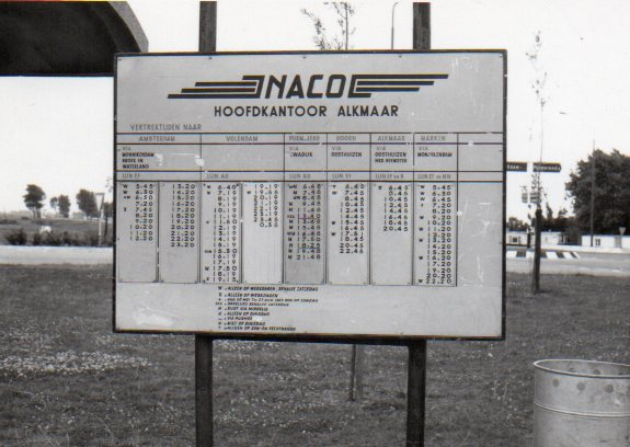 Informatiebord van de busonderneming NACO te Edam